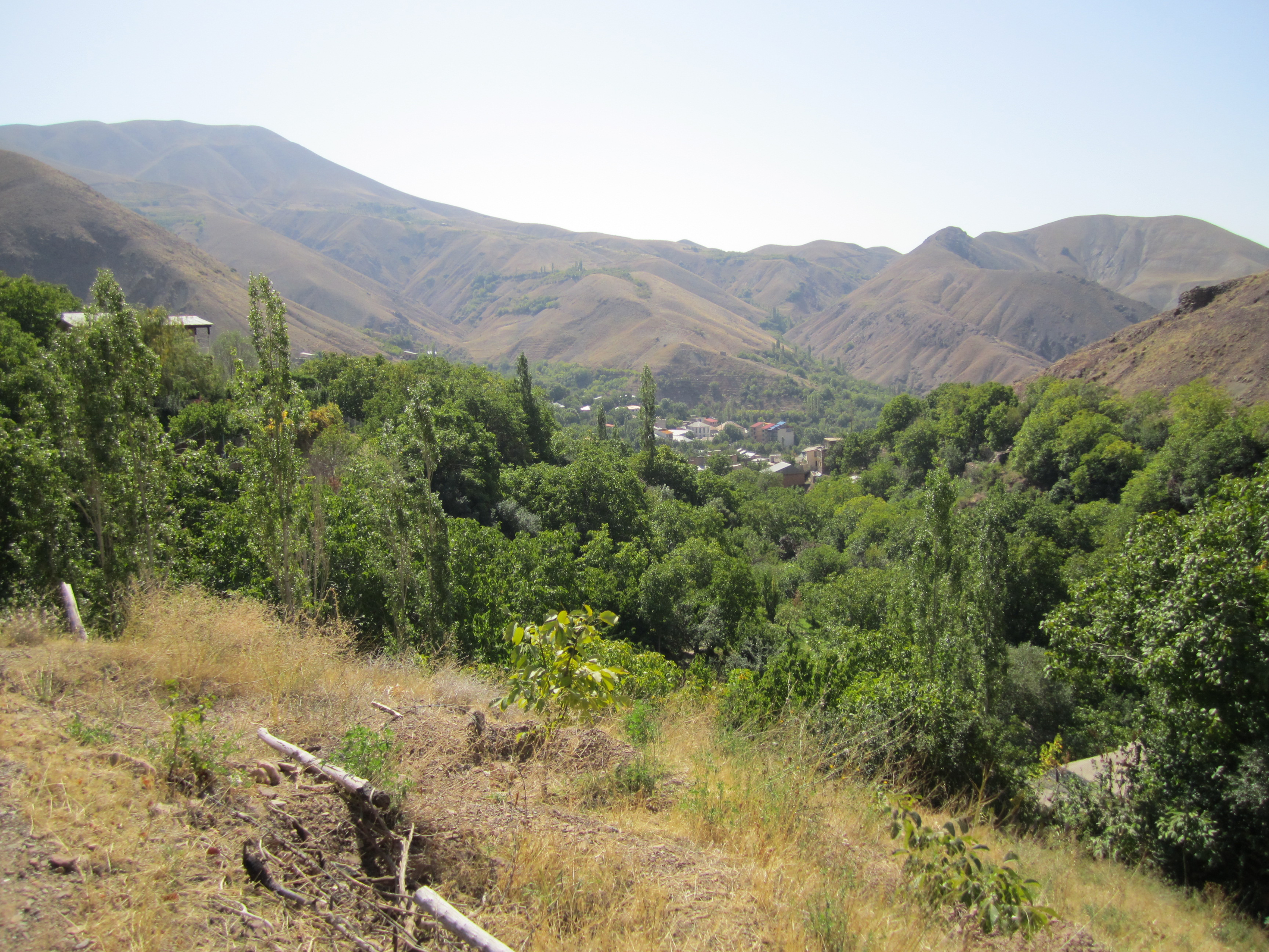 بیشه زارهای اطراف روستای برگ جهان از توابع دهستان لواسان کوچک